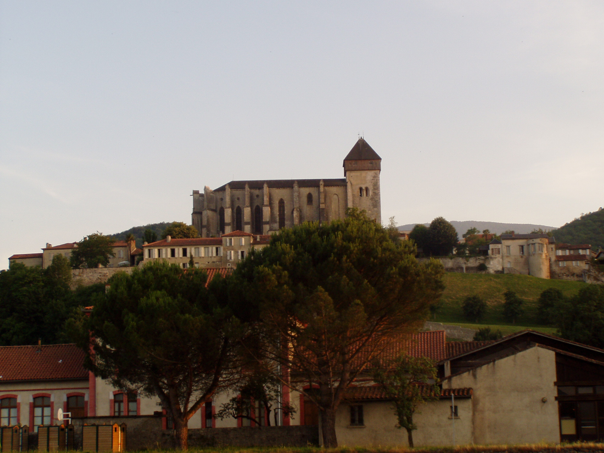 la ville haute de Saint-Bertrand-de-Comminges avec sa cathédrale